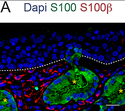 Fig. 2. Caracterización de la lámina propia olfativa. A, Inmunotinción de la mucosa olfatoria para S100 y S100β. En todos los paneles de inmunofluorescencia, Dapi se utilizó como contratinción nuclear. Las líneas discontinuas indican la membrana basal, los asteriscos amarillos indican las glándulas de Bowman. Barra de escala= 20 μm.